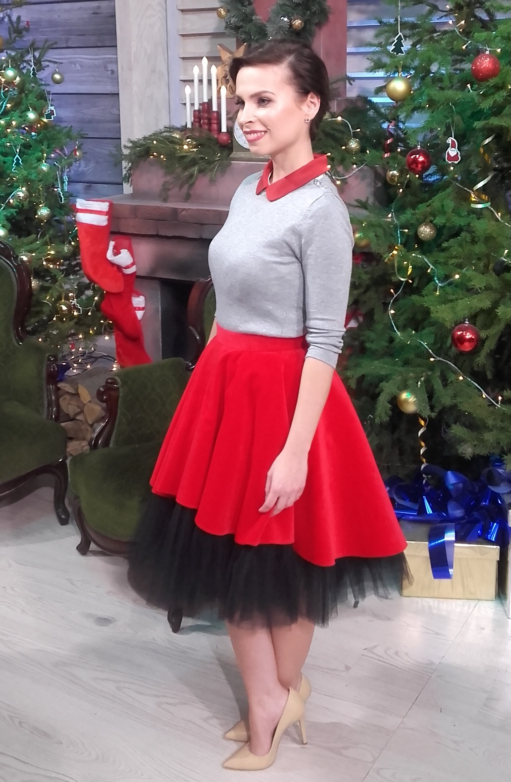 Polska youtuberka Paulina Mikuła w grudniu 2016 roku.